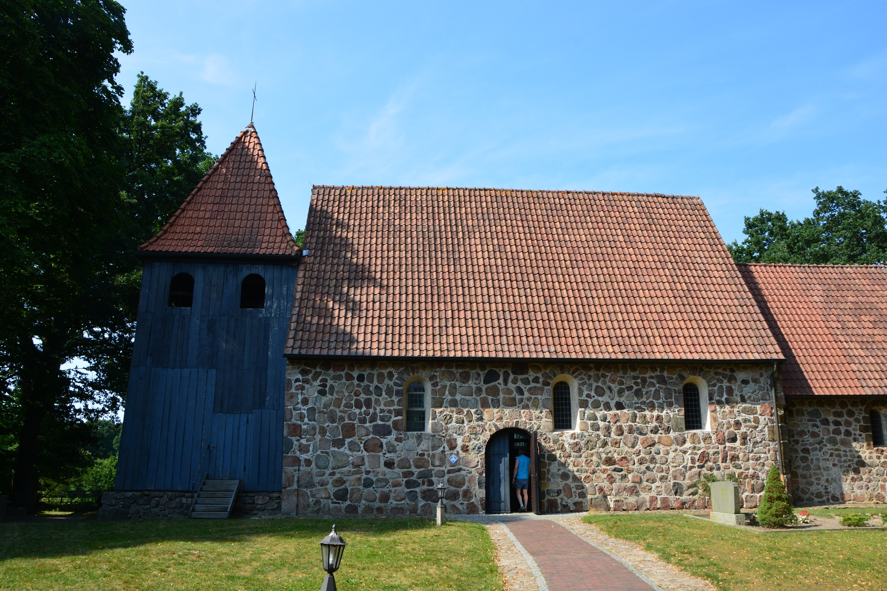 Die kleine Kirche St. Lucia zu Wulsbüttel von Süden.